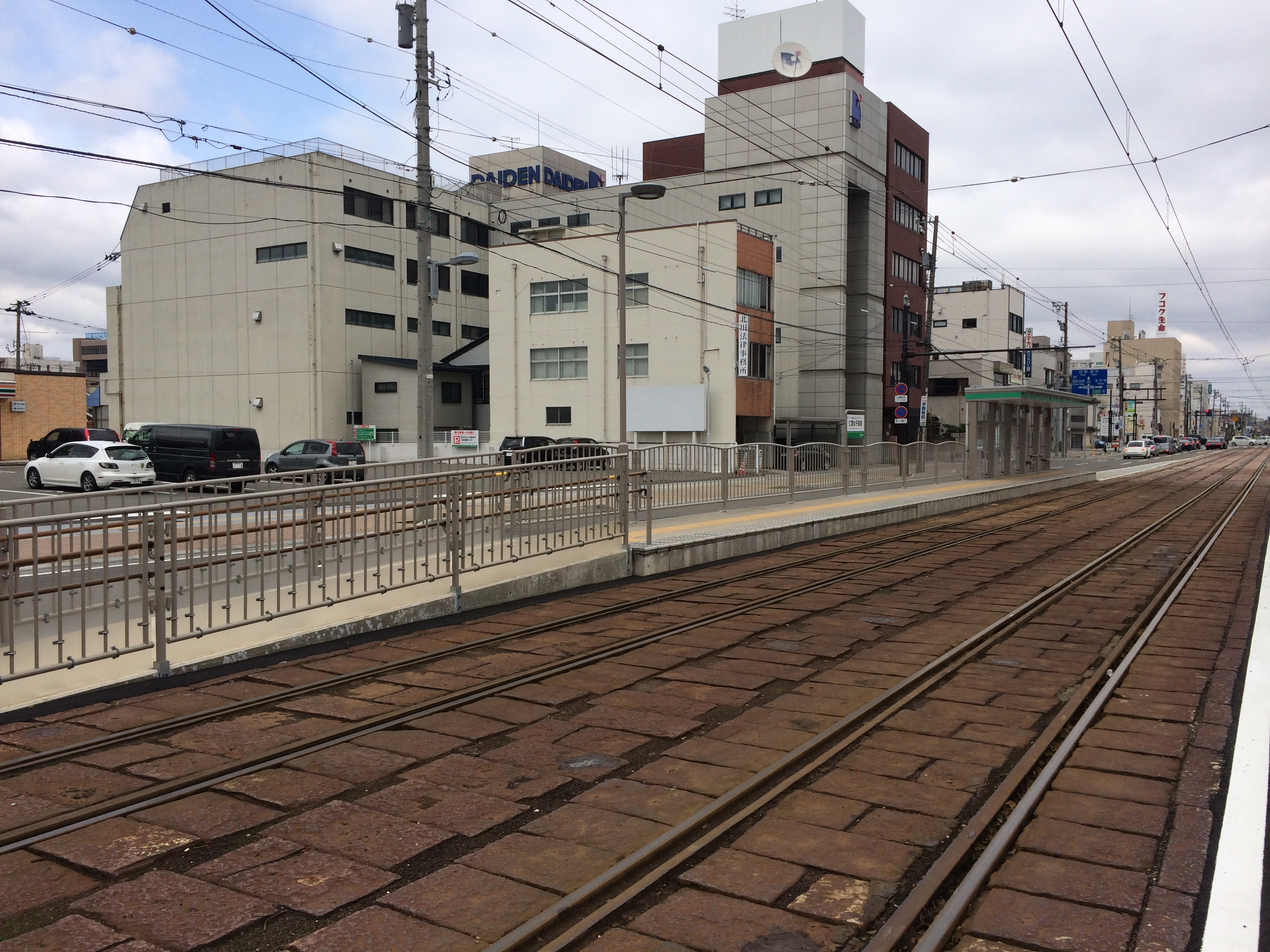 仁愛女子高校電車停留場下りホーム 3月2日投稿者が撮影